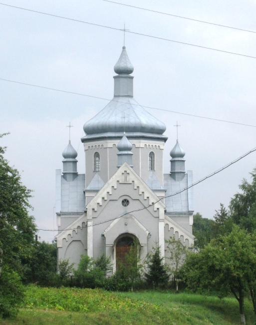 Церква в селі Давидів